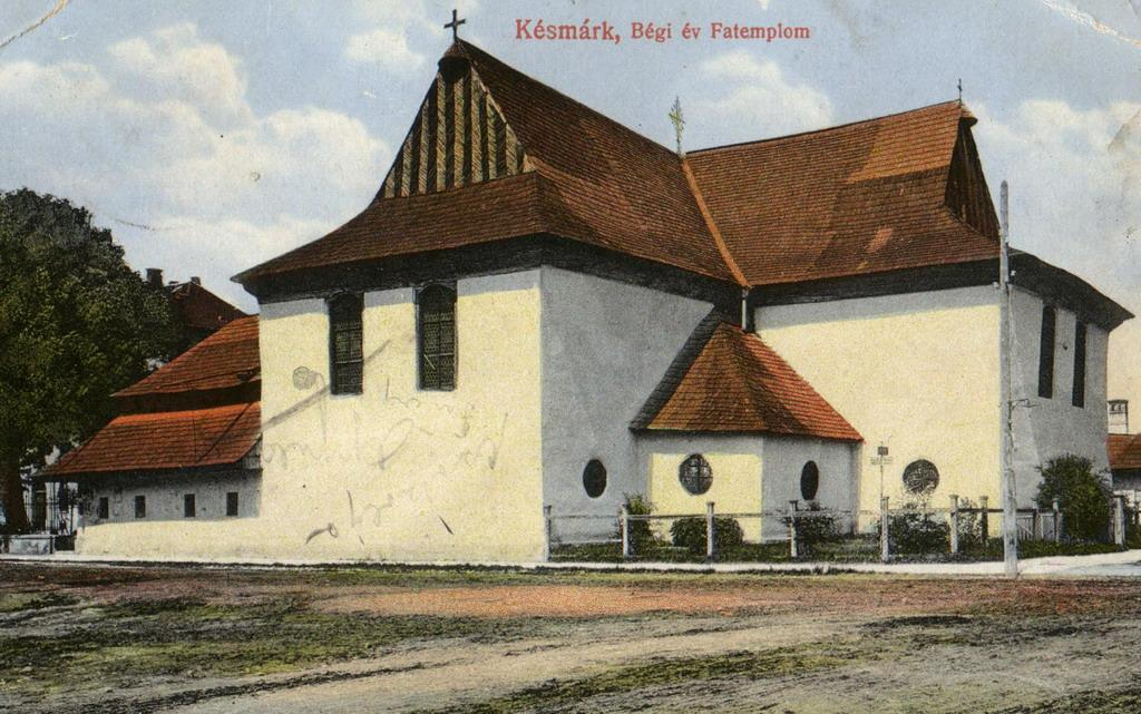 Starý Kežmarok - Drevený artikulárny Kostol Najsvätejšej Trojice